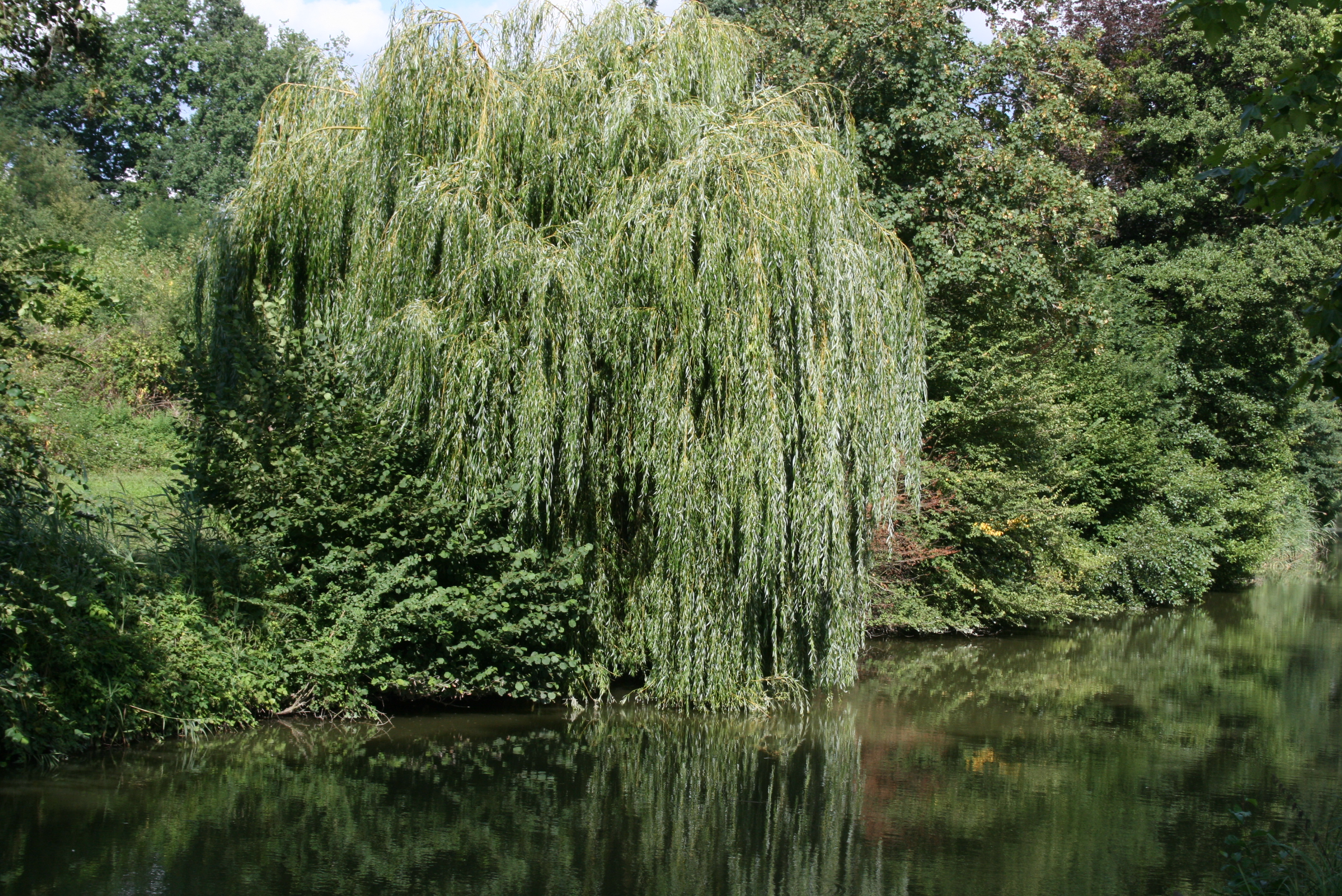 Canal d’Orléans. Berge arborée (saules).